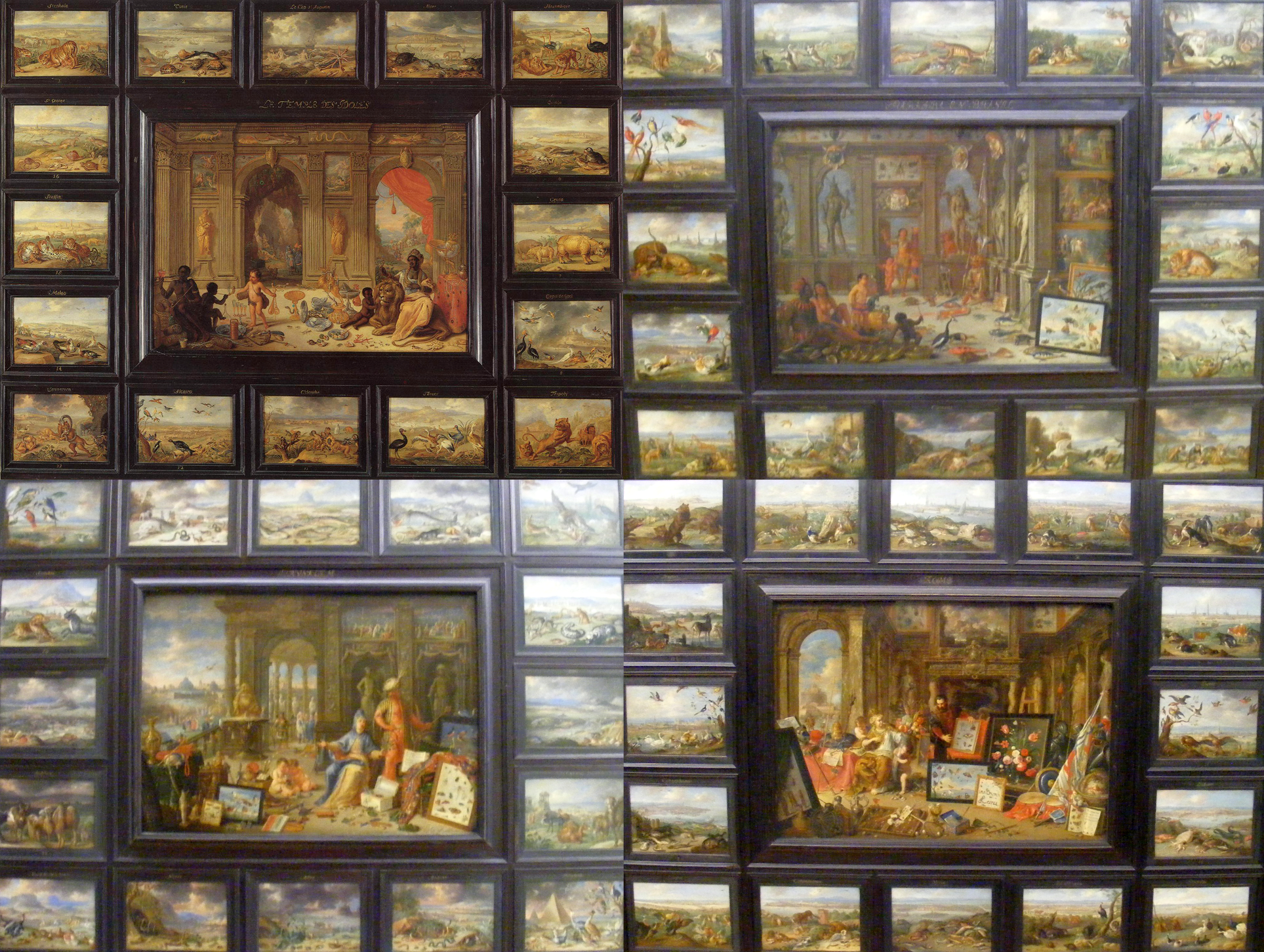 Selbstgefertigte Zusammenstellung